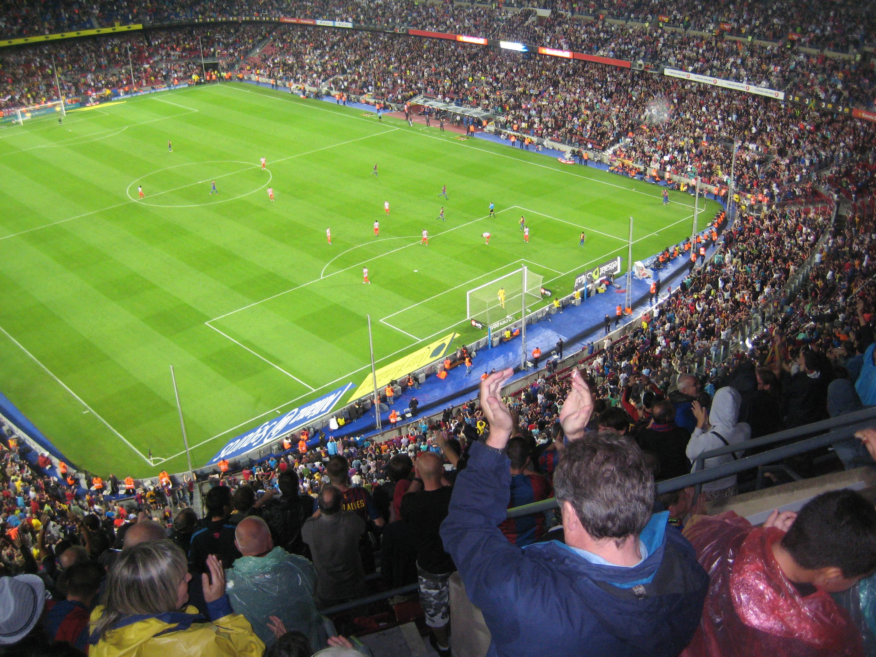 Матч на "Камп Ноу", Барселона – Атлетико Мадрид 5-0, 24 сентября 2011 года